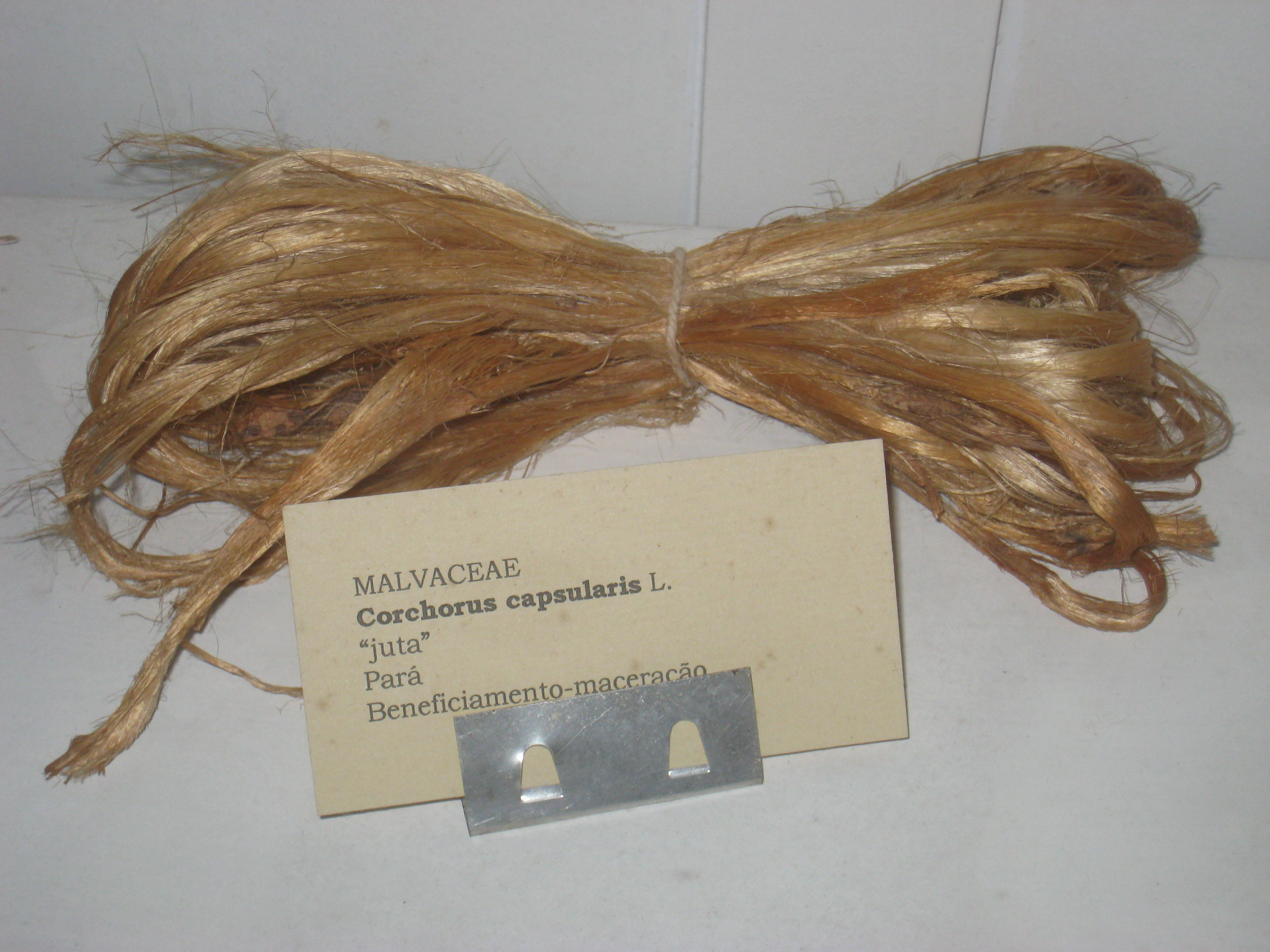 Corchorus capsularis specimen in the Museu Botânico Dr. João Barbosa Rodrigues, Jardim Botânico de São Paulo, São Paulo City, SP, Brazil.